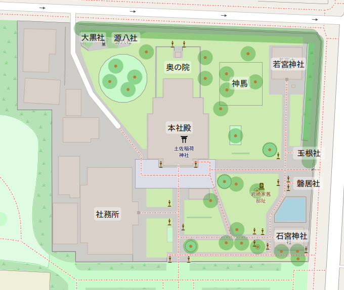 土佐稲荷神社の境内図